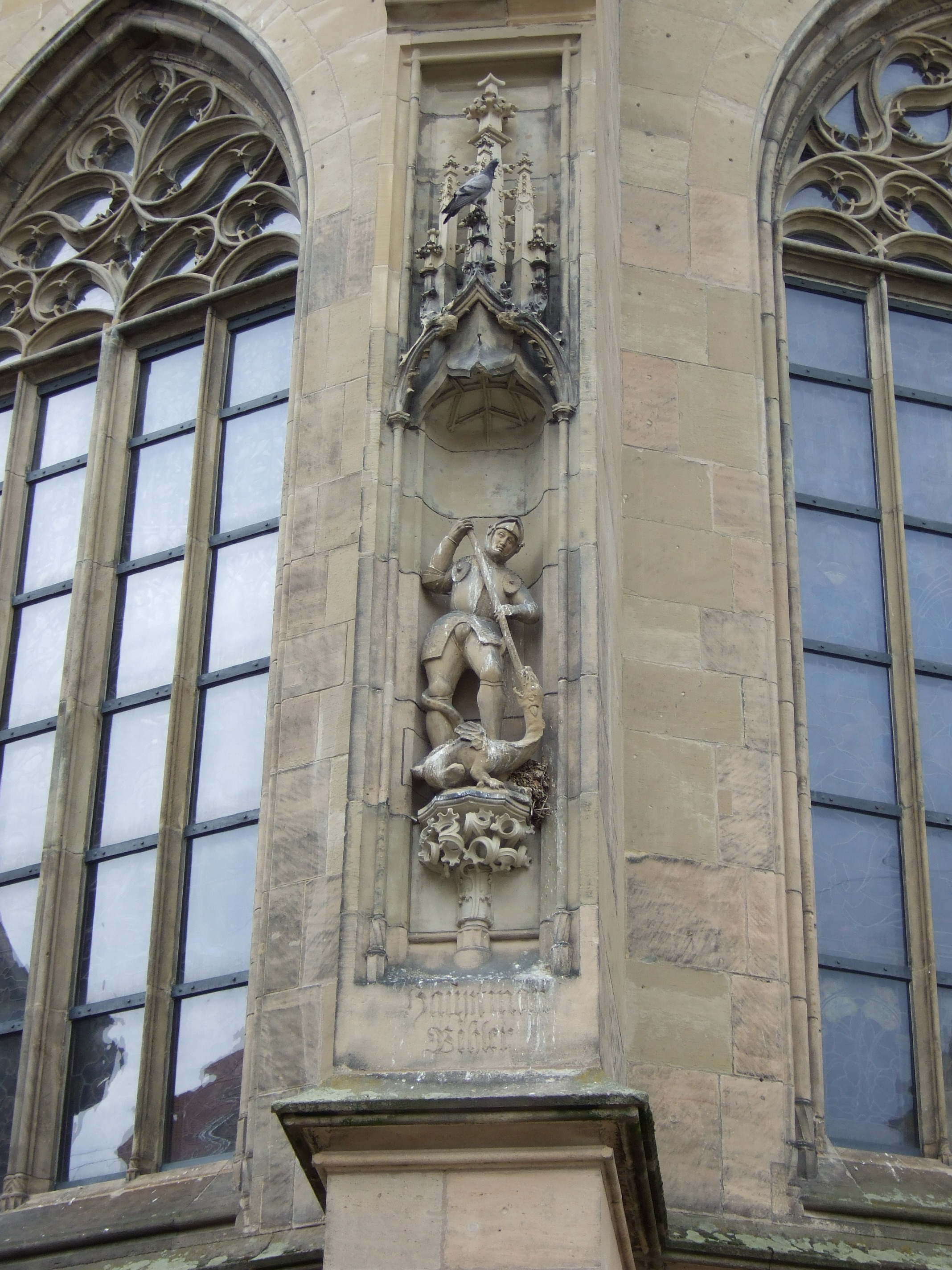 Schorndorf - Evangelische Stadtkirche - Sankt Georg